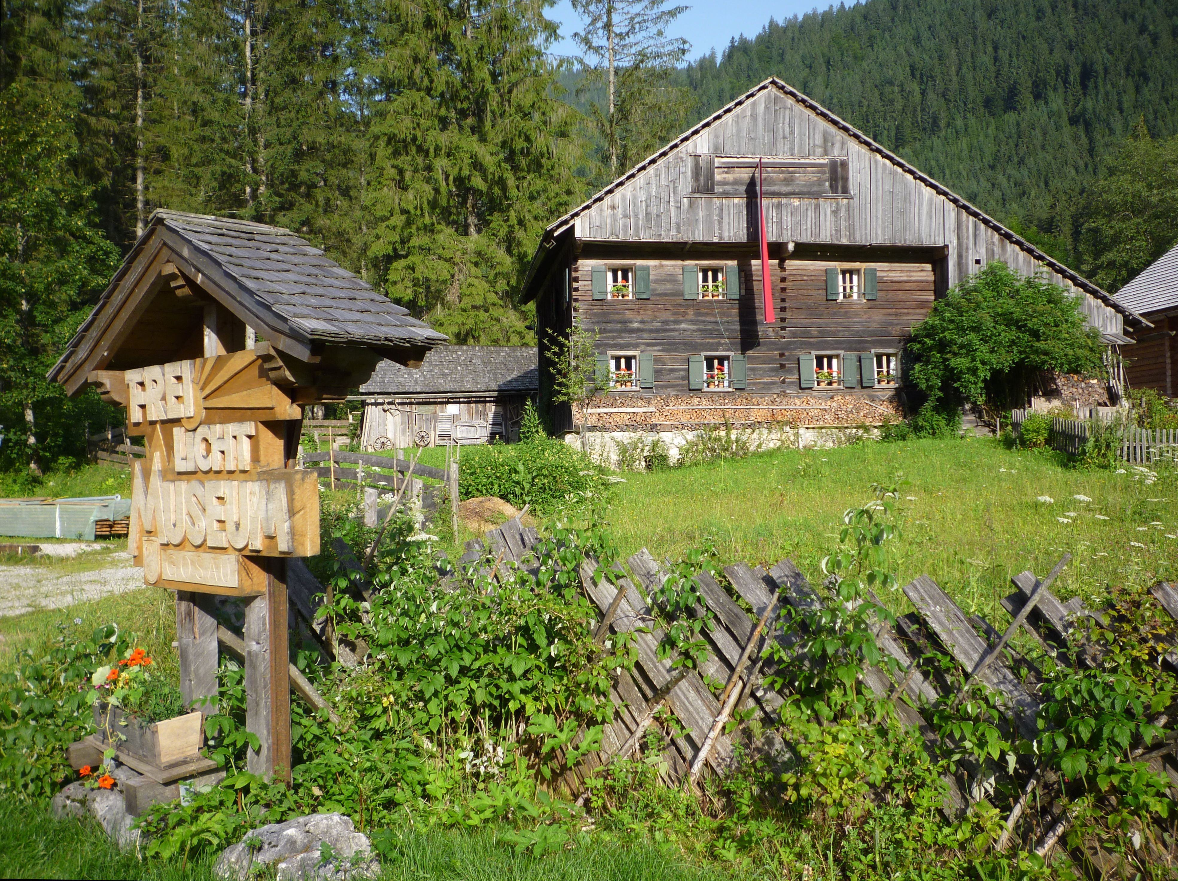 Bauernhausmuseum in Gosau-Hintertal